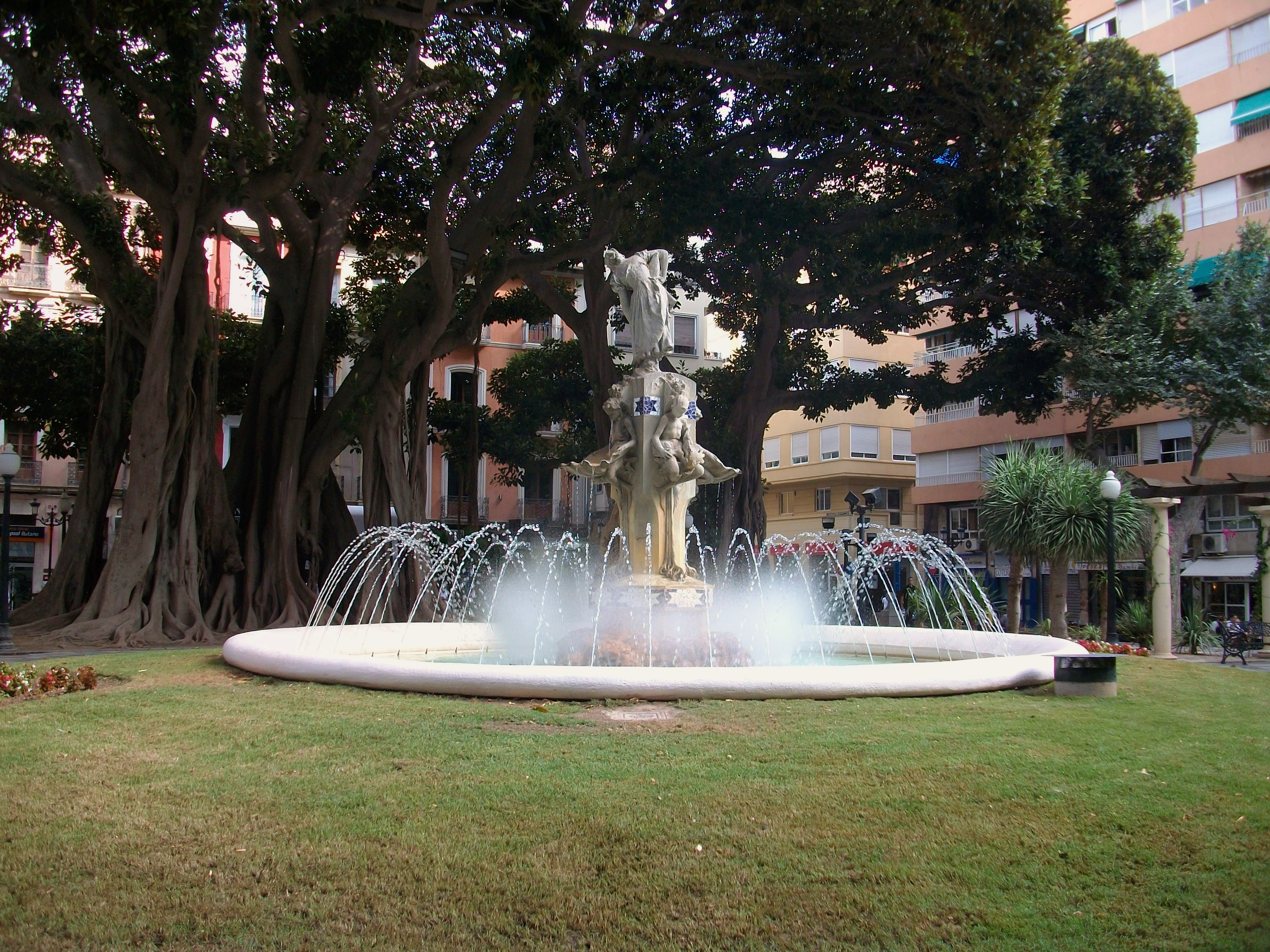 Font de l'aiguadora a la plaça de Gabriel Miró, Alacant.